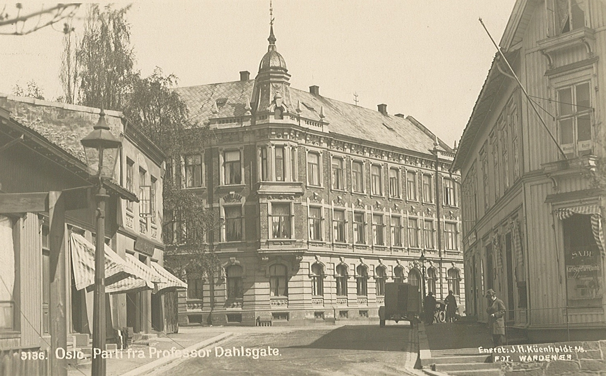 Fra Professor Dahls gate i det skrå krysset der Uranienborgveien går over i Majorstuveien. Murgården midt på bildet hadde adresse Dahls gate 12B (nå A og B). Trebygningene på hver side (hhv. nr. 21 til venstre og 22 til høyre) er revet og sistnevnte erstattet med en murgård. J.H. Küenholdt-postkort fra ca. 1930. Foto: Thorleif Wardenær. Fra Byhistorisk samling hos Oslo Museum.